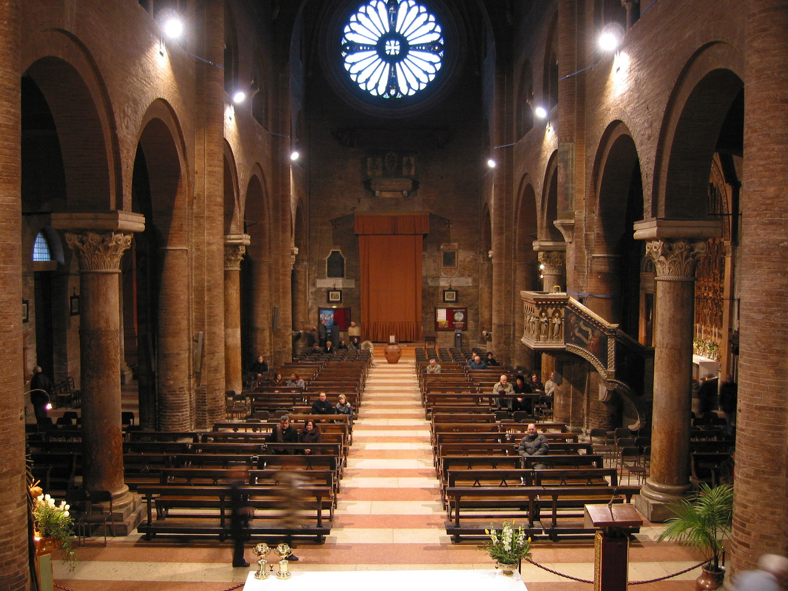 Modena, Emilia Romagna, Italia